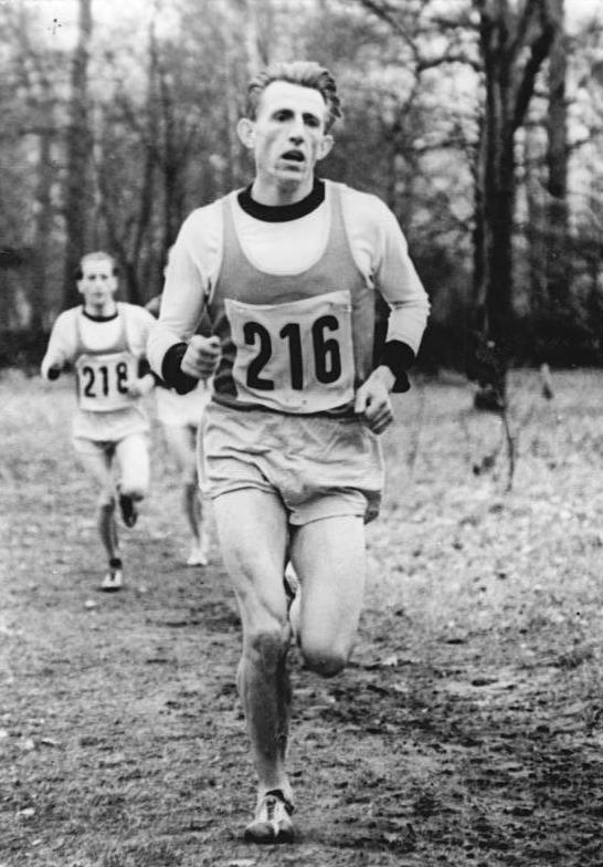 Havenstein Zentralbild Funck 24.3.1957 Berliner Waldlauf-Meisterschaften In Berlin-Schönholz fanden am Sonntag, dem 24.3.1957, die Berliner Waldlauf-Meisterschaften statt. Damit wurde das Leichtathletik-Jahr 1957 offiziell eröffnet. UBz: Berliner Meister im Waldlauf 1957 wurde Havenstein vom ASK Vorwärts Berlin.